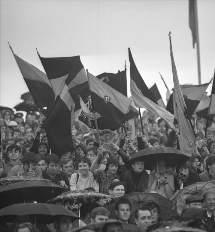 Oberliga, Dynamo Dresden-Chemie Leipzig, Fans Zentralbild/Häßler/5.6.71/Dresden: Fußball-Oberliga. Dynamo Dresden - Chemie Leipzig 3:1/ Auch ein längerer Gewitterguss konnte 22000 fußballbegeisterte Dresdner nicht abhalten, den neuen DDR-Meister Dynamo Dresden stürmisch zu feiern.